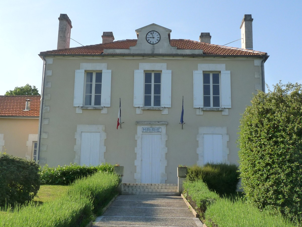 Mairie de Gardes-Le-Pontaroux (Charente, France)